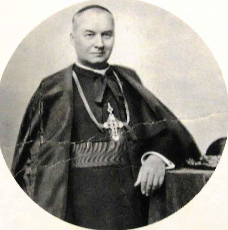 Je to fotografie zhotovená z publikace "Pražský katolický sjezd" proto, že na Wikipedii u profilu k. K. schází fotografie kardinála Kašpara, ale vědět co to obnáší, bych žádnou fotku nedodával.